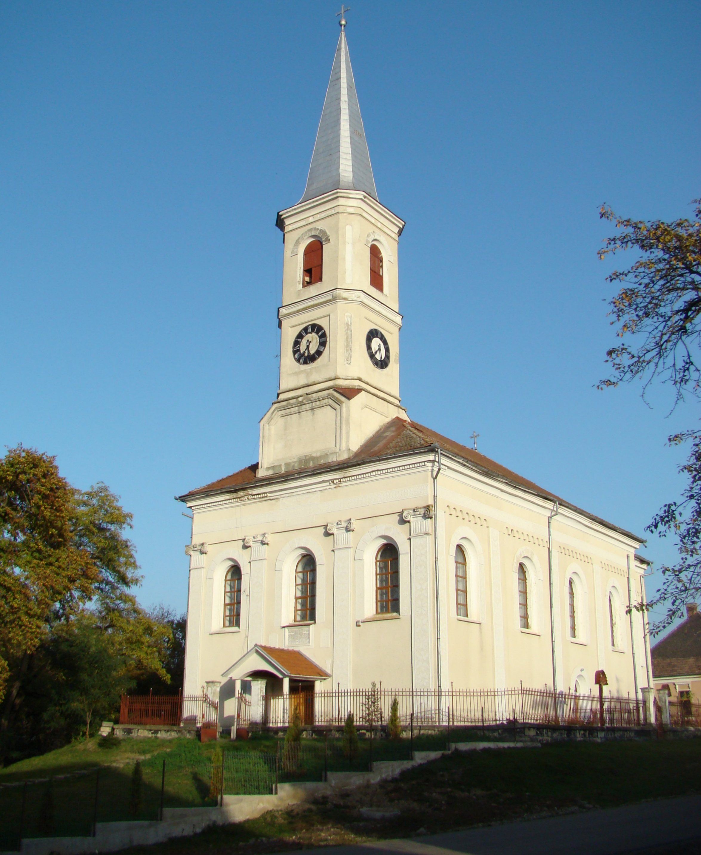 Biserica evanghelică C.A., azi biserica ortodoxă „Pogorârea Sf.Duh”,sat Dorolea; comuna Livezile, județul Bistrița-Năsăud